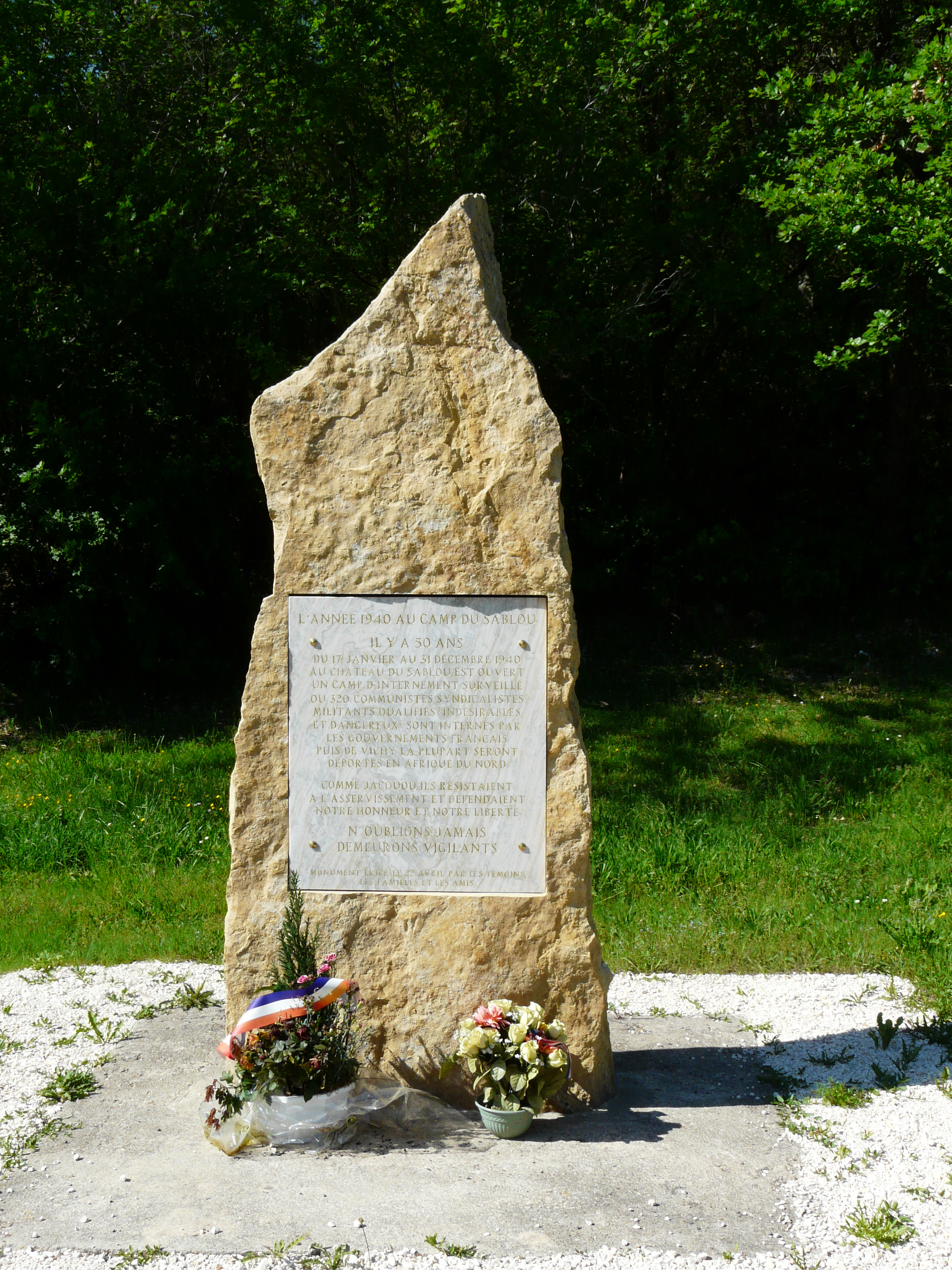 Stèle à la mémoire des internés communistes du château du Sablou, Fanlac, Dordogne, France.